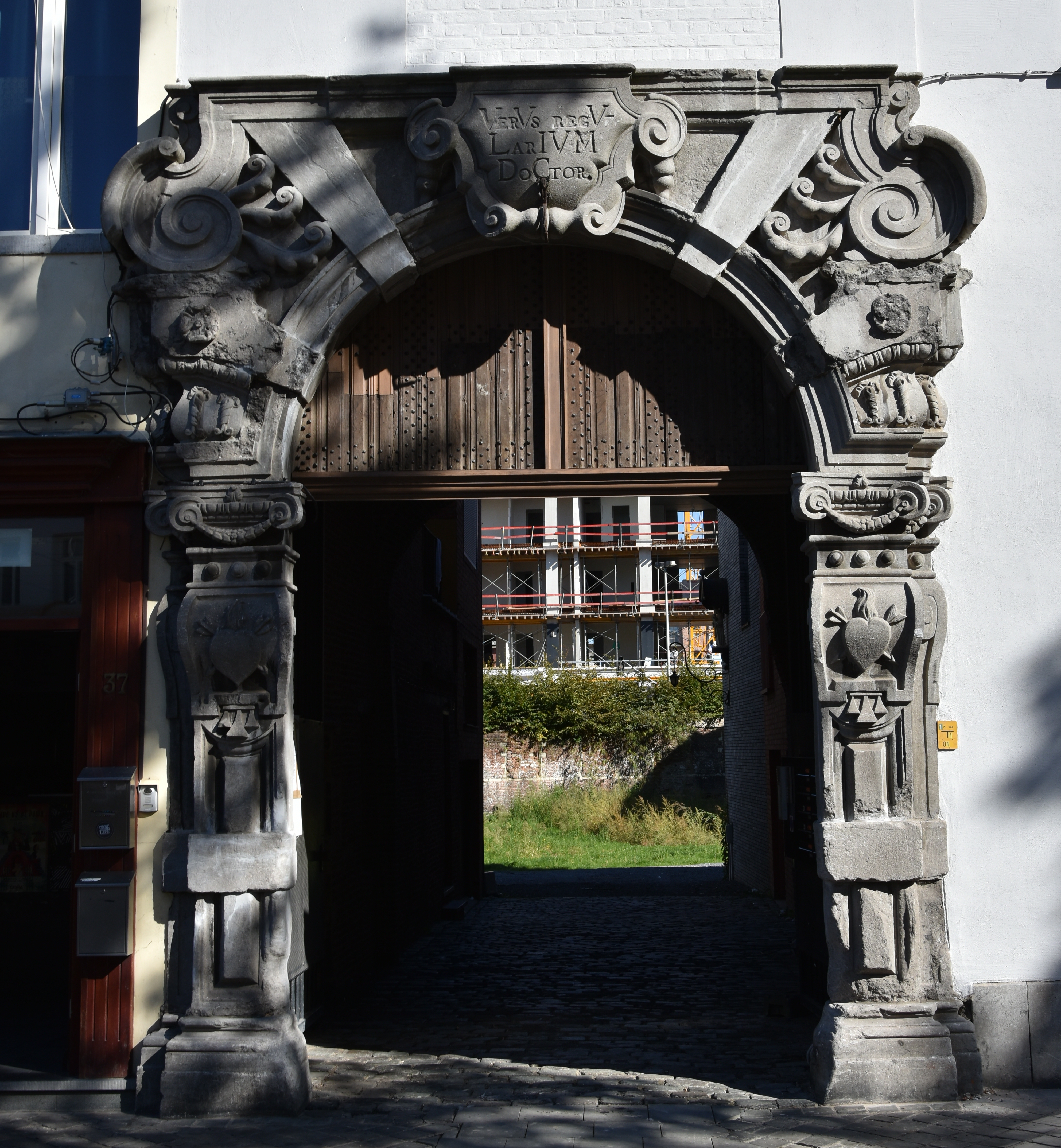 Barokpoort 1671 (onrorrend erfgoednummer 4913) falcontinnenklooster Falconplein Antwerpen 27-09-2018 This photo of immovable heritage has been taken in the Flemish Region